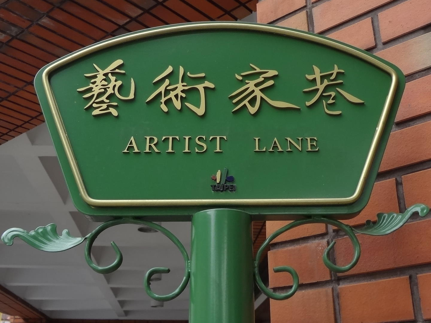 中文（台灣）: 臺北市中正區重慶南路一段147號（東華大樓）旁小巷道，藝術家巷標示牌。